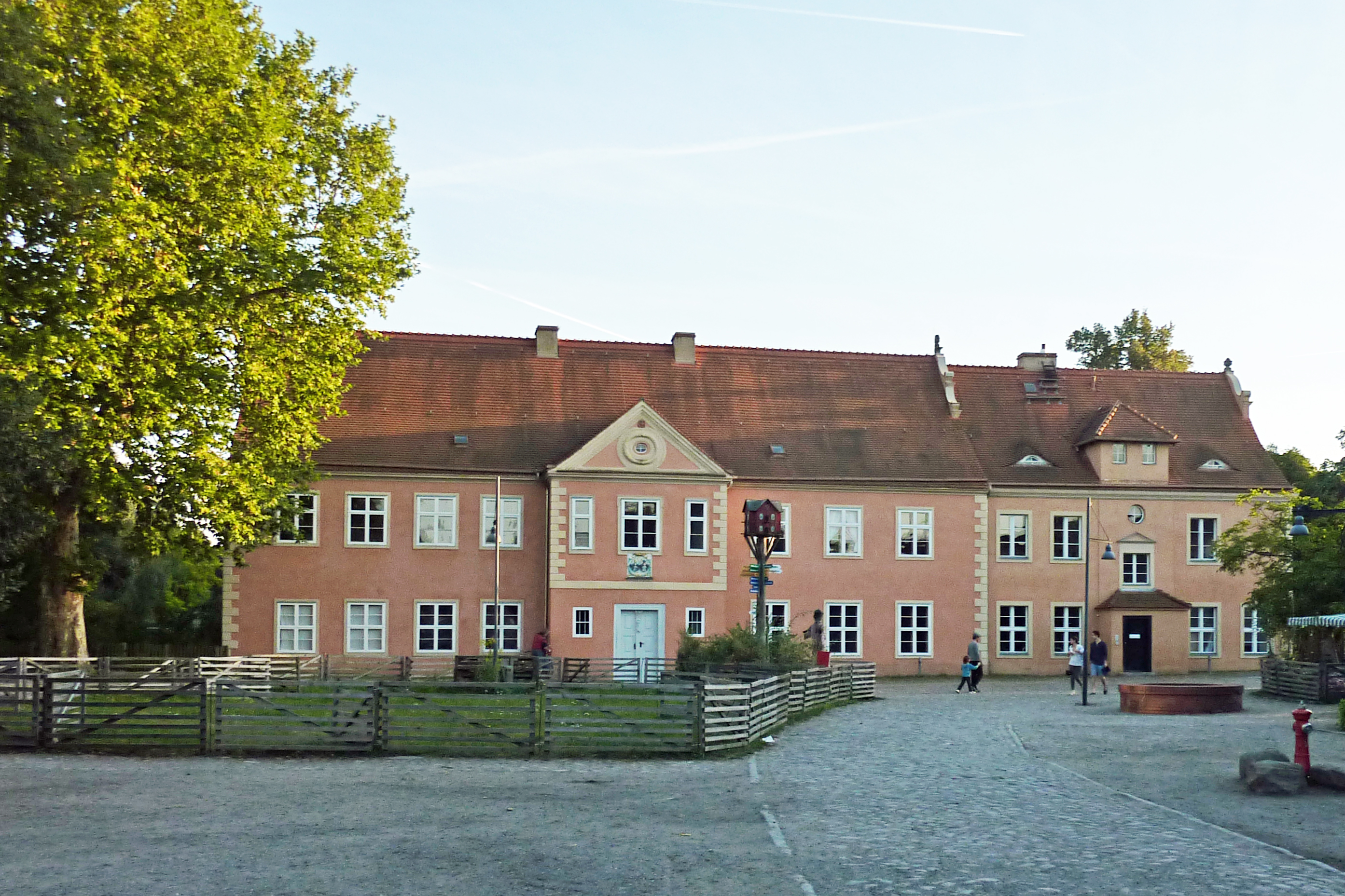 Herrenhaus aus dem Jahr 1560 und Hof im Freilandmuseum Domäne Dahlem, Berlin, Deutschland